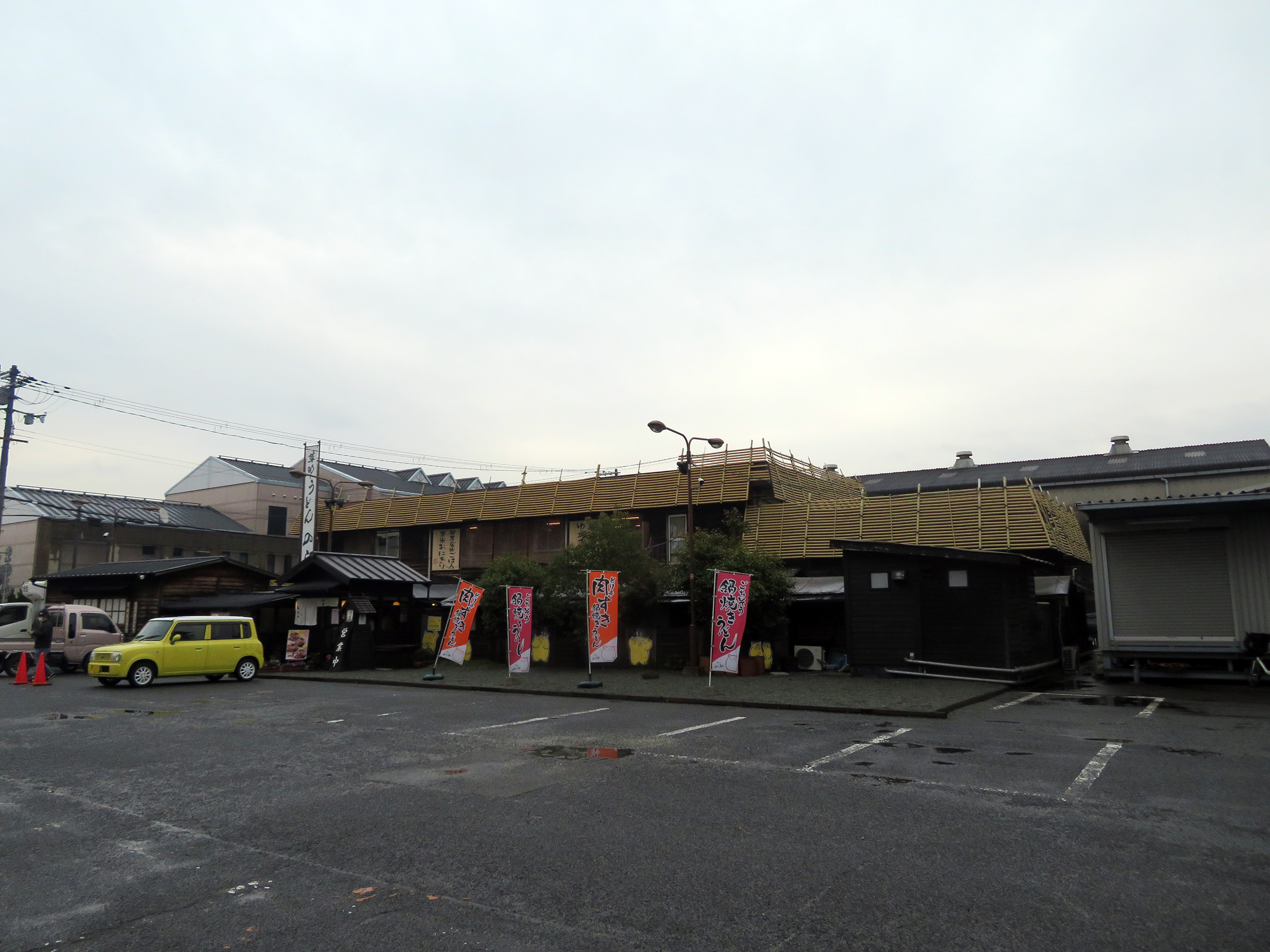 のらや鳳本店を撮影。